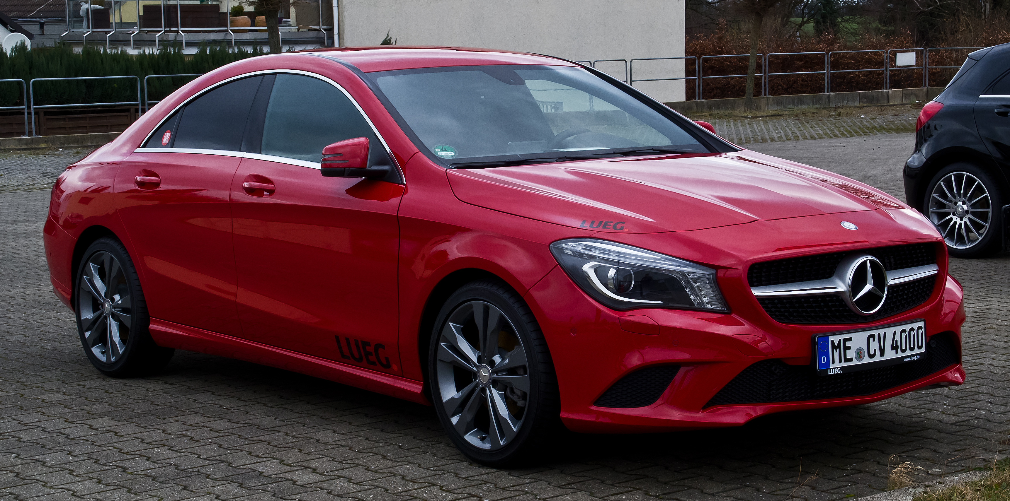 Mercedes-Benz CLA 180 Urban (C 117)